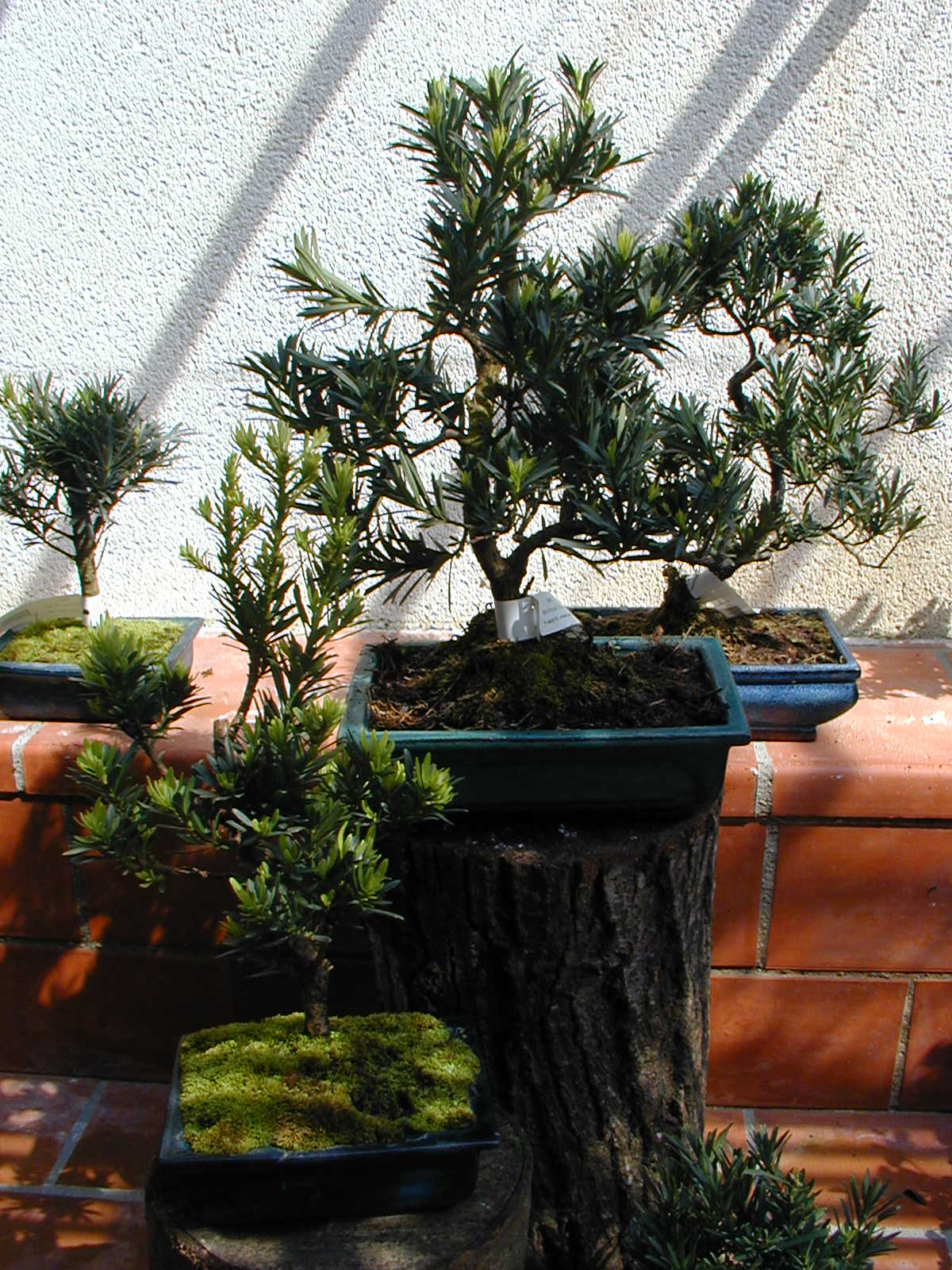 20040413 Bonzaï 06 Cette photographie de plante a été prise par Utilisateur:Semnoz le 13 avril 2004, à la Bambouseraie de Prafrance à Anduze (Gard) et placée sous licence GFDL Photo of plant, taken by wiki-french-user Semnoz in April 2004, and placed with GFDL licence. Utilisateur:Semnoz 13 avril 2004